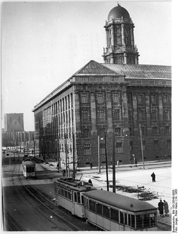 Berlin, Stadthaus, Straßenbahn Zentabild-Junge Wjt-Hó. 6 Motive 24.#.1955 Berlin Alten Stadthaus, Koster- Ecke Stralauer Aufnahme Januar 1955